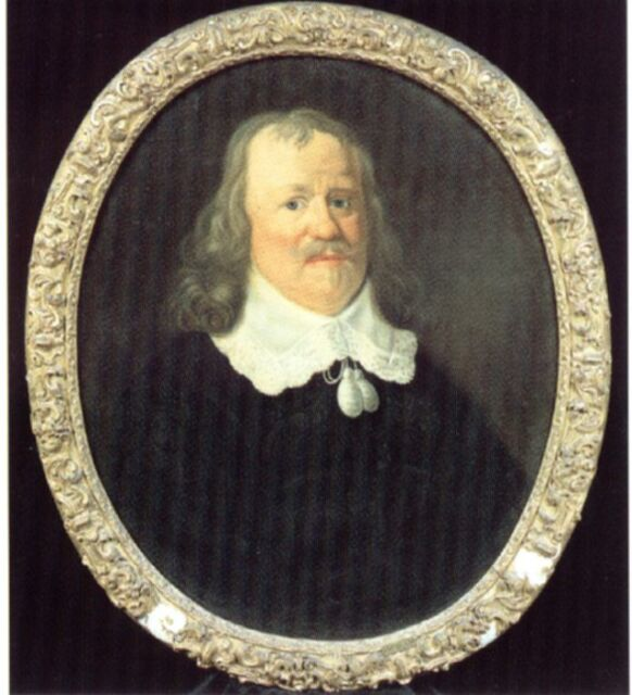 Godart van Reede, 1588-1648, unbekannter Künstler